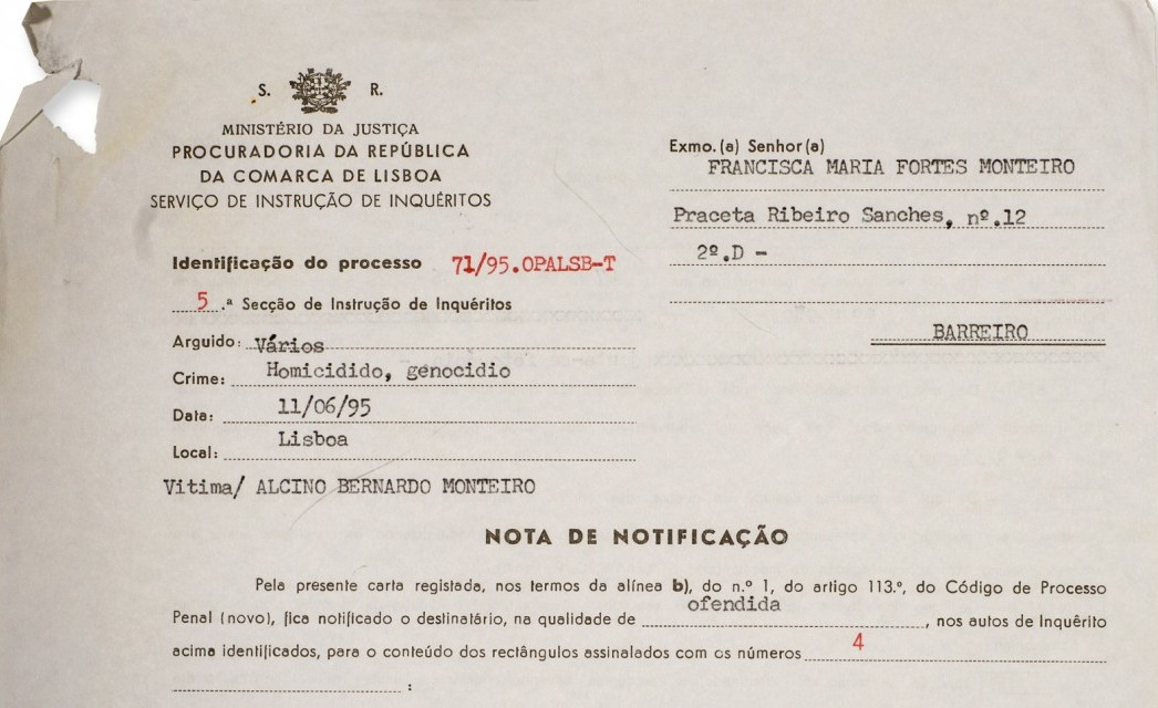 Identificação do processo de Alcindo Monteiro